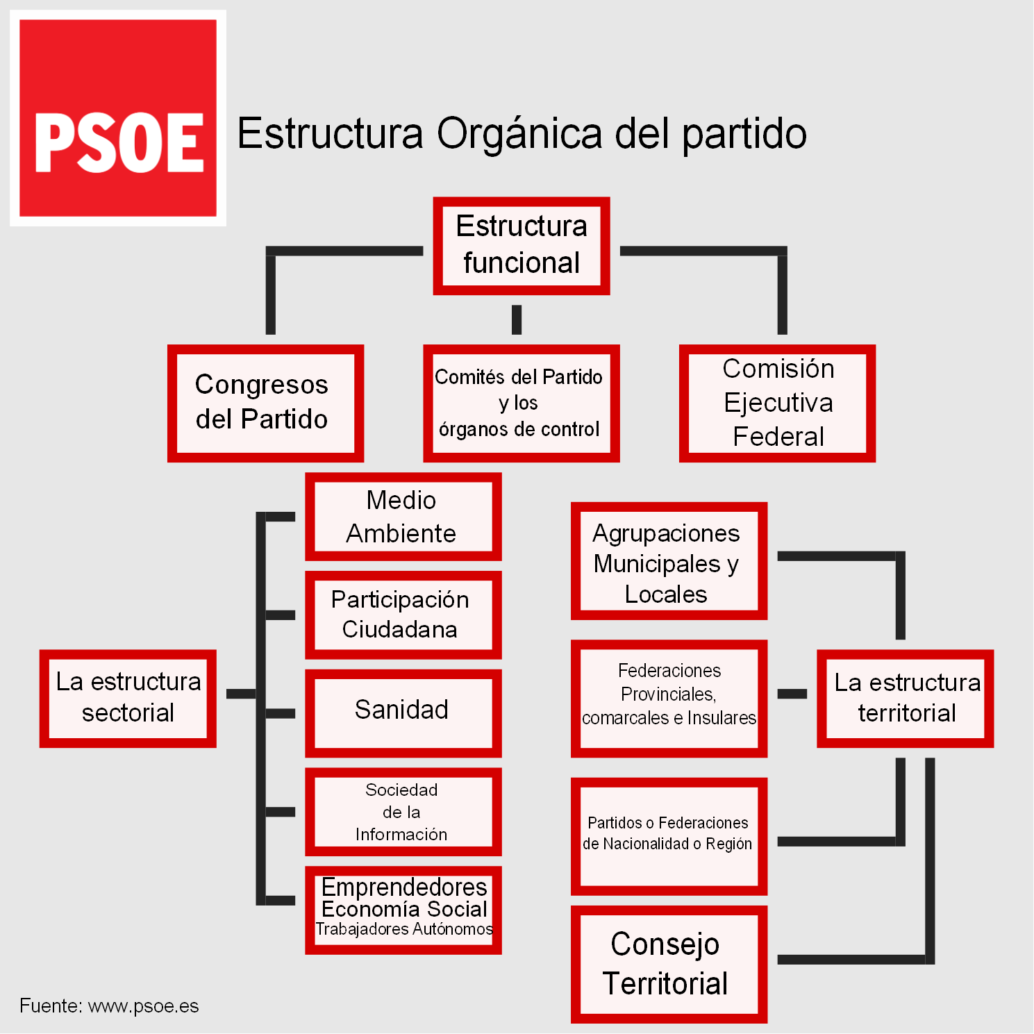 Estructura Orgánica del PSOE. Fuente